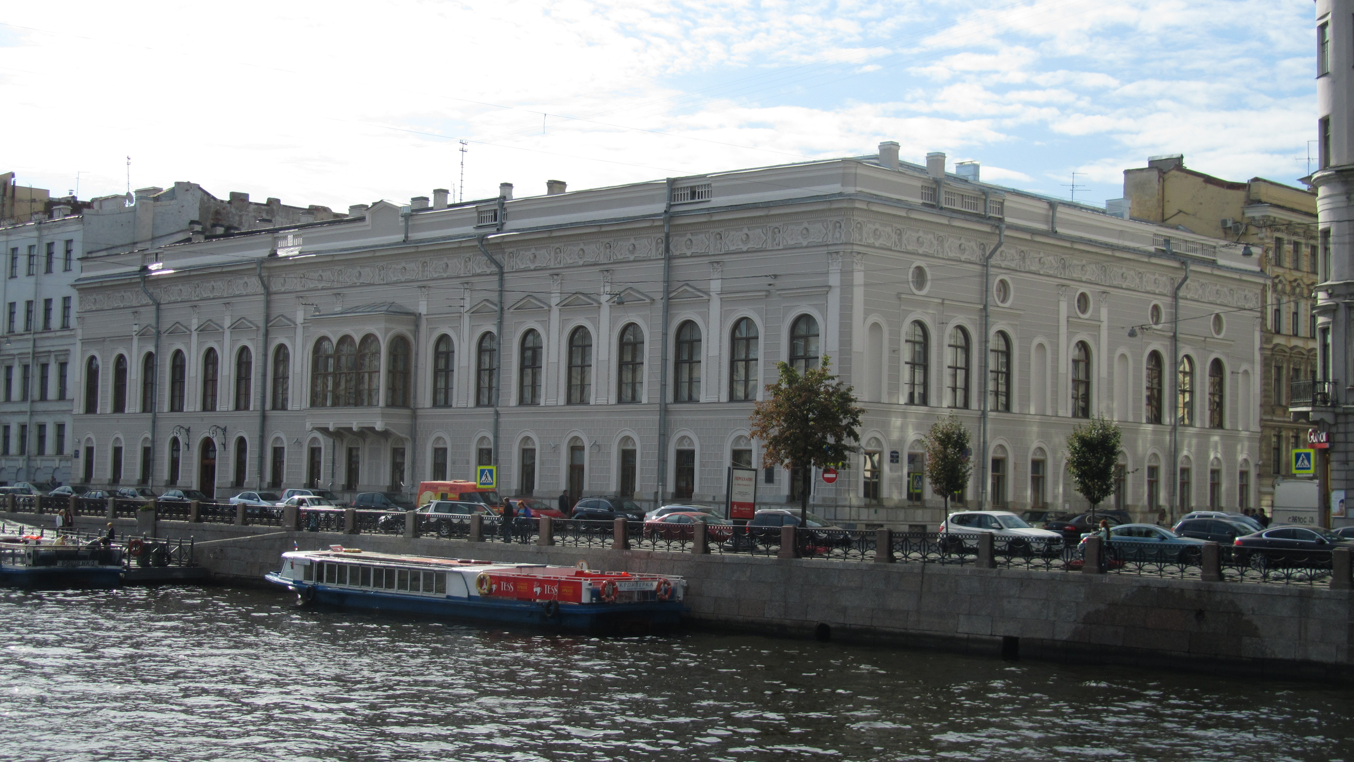 Дворец Нарышкина Д. П. (Шуваловой С. Л.) (Санкт-Петербург и Лен.область, Санкт-Петербург, р. Фонтанки наб., 21, Итальянская улица, 39)